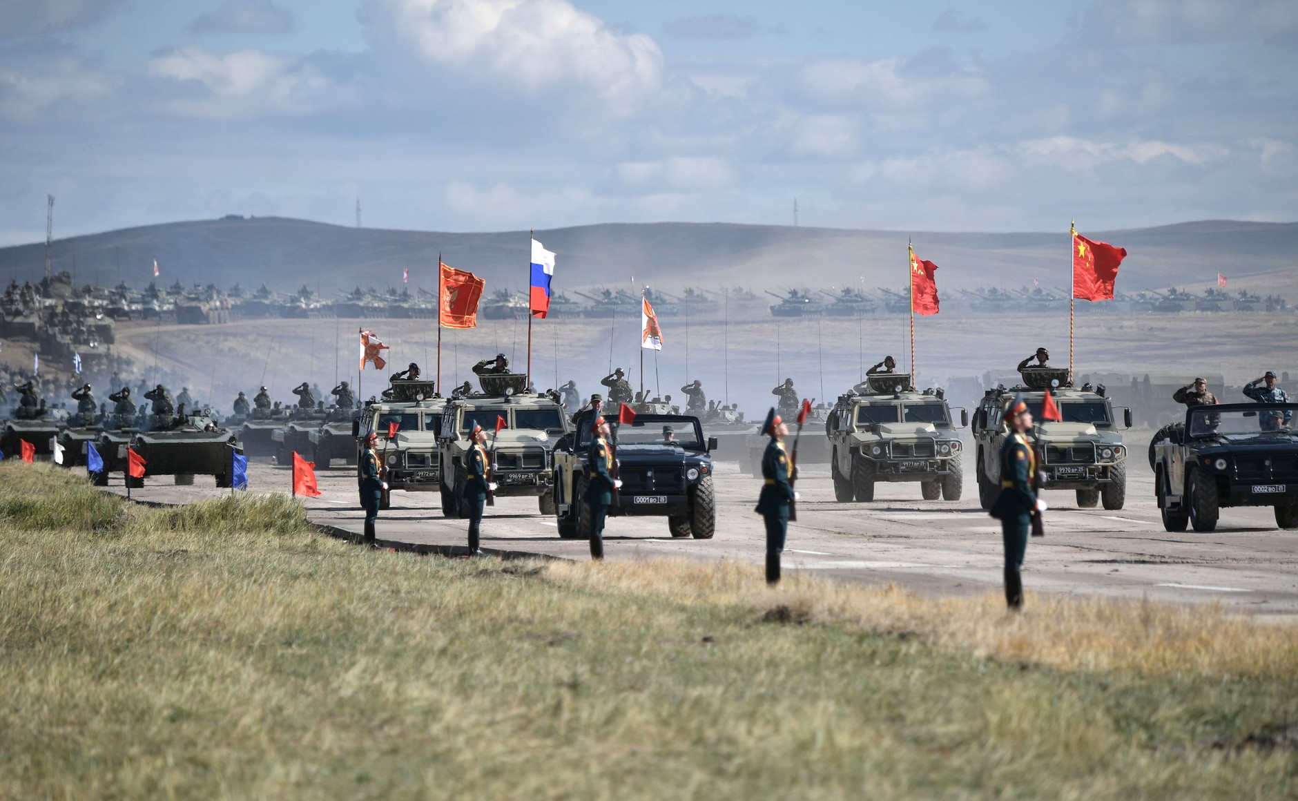 По окончании военных манёвров «Восток-2018» состоялся полевой смотр войск.